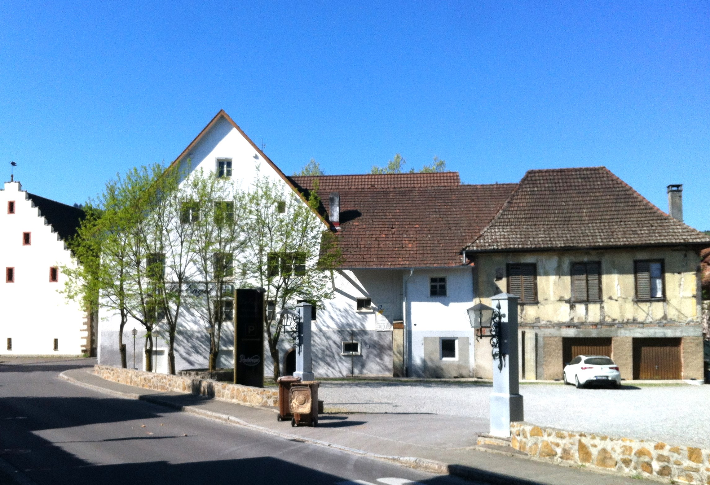 Gasthaus Der Engel in Rheinheim, Ortsteil der Gemeinde Küssaberg im Landkreis Waldshut in Baden-Württemberg. Der Baukomplex von der Nordseite aus. 2020 im Ausbau.